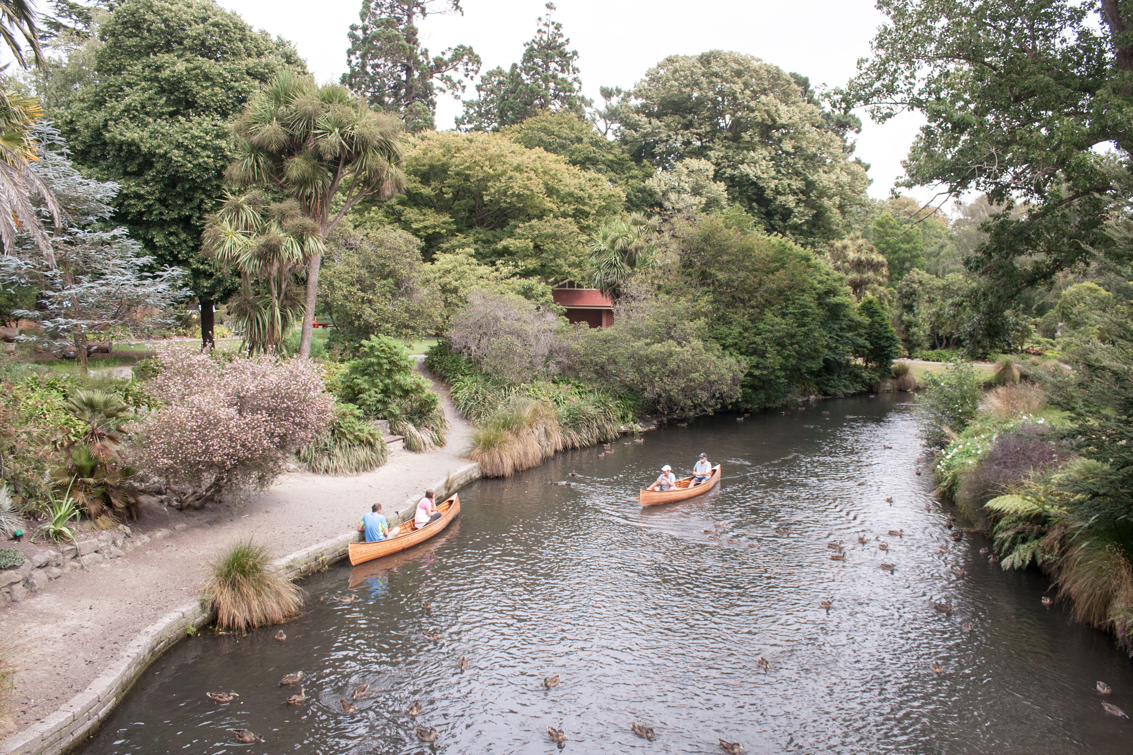 Christchurch Botanic Gardens, Avon river